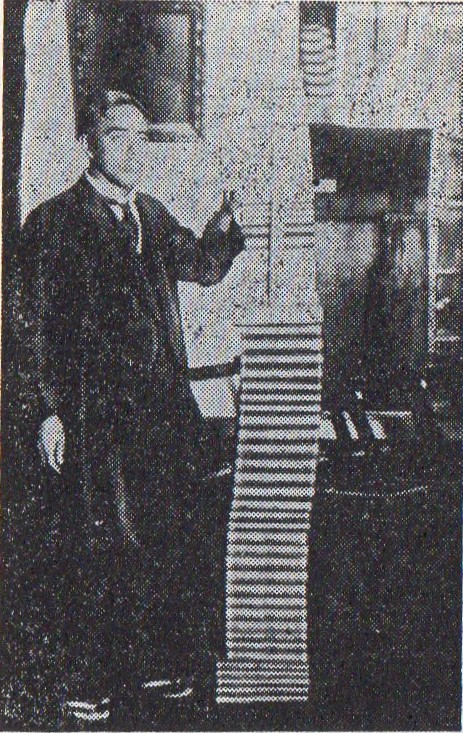 内村鑑三と自著と十字架(1925年7月)